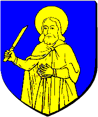 Blason de RINGENDORF